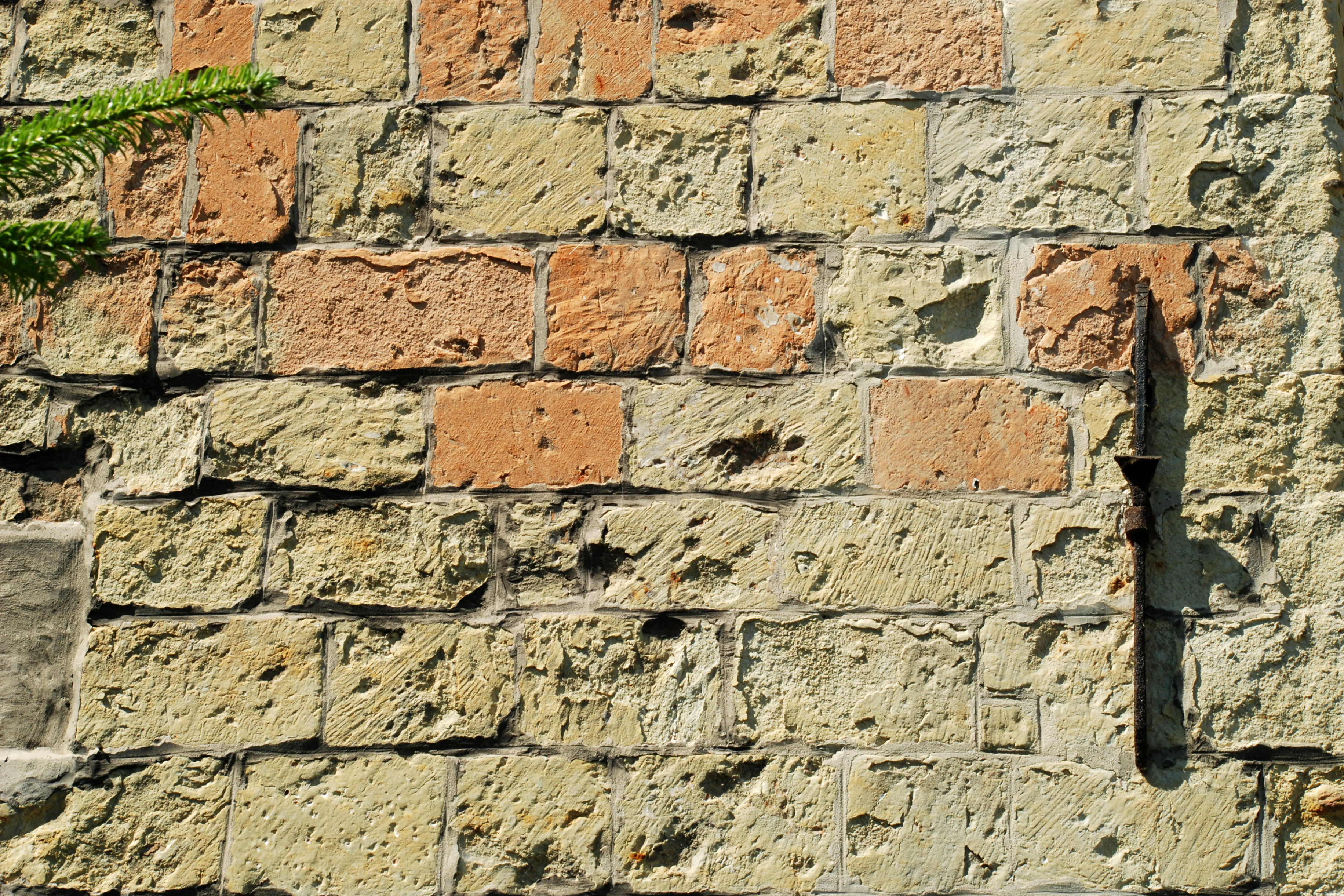 Belgique - Brabant wallon - Hélécine - Neerheylissem - Eglise Saint-Sulpice